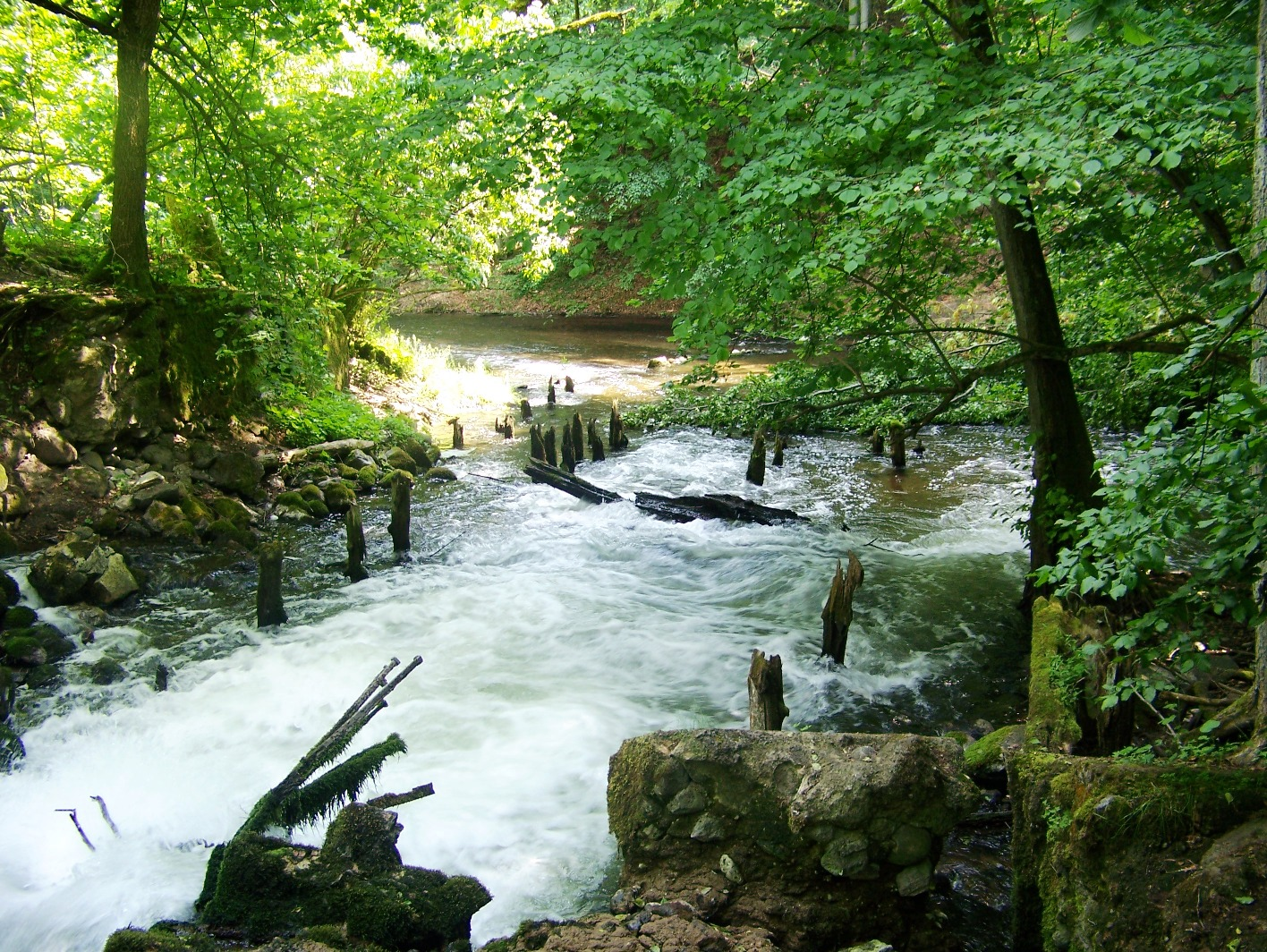 Ruiny starej węgorni nad rzeką Płociczną, Drawieński Park Narodowy